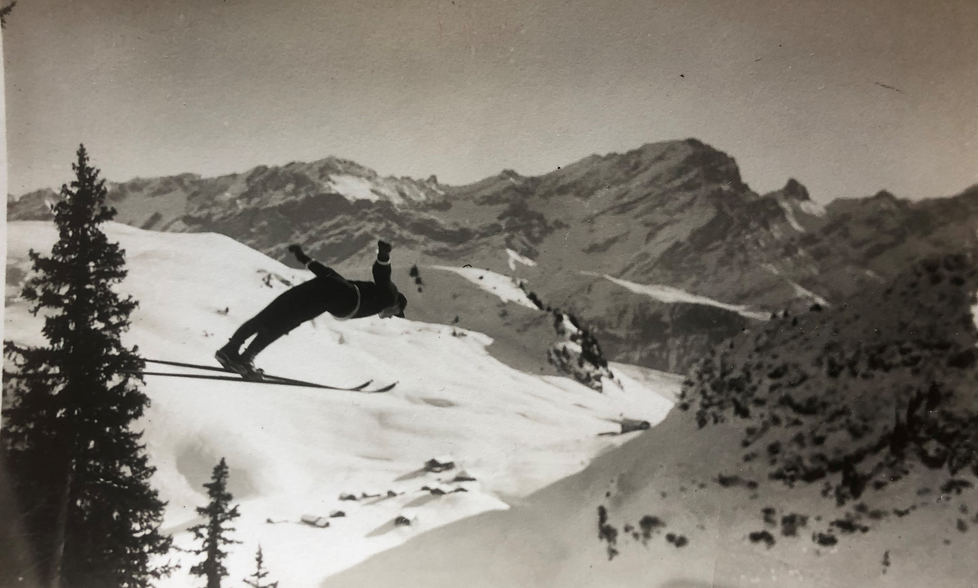 Zdjęcie przedstawia bicie rekordu Szwajcarii - skok na odległość 76 metrów